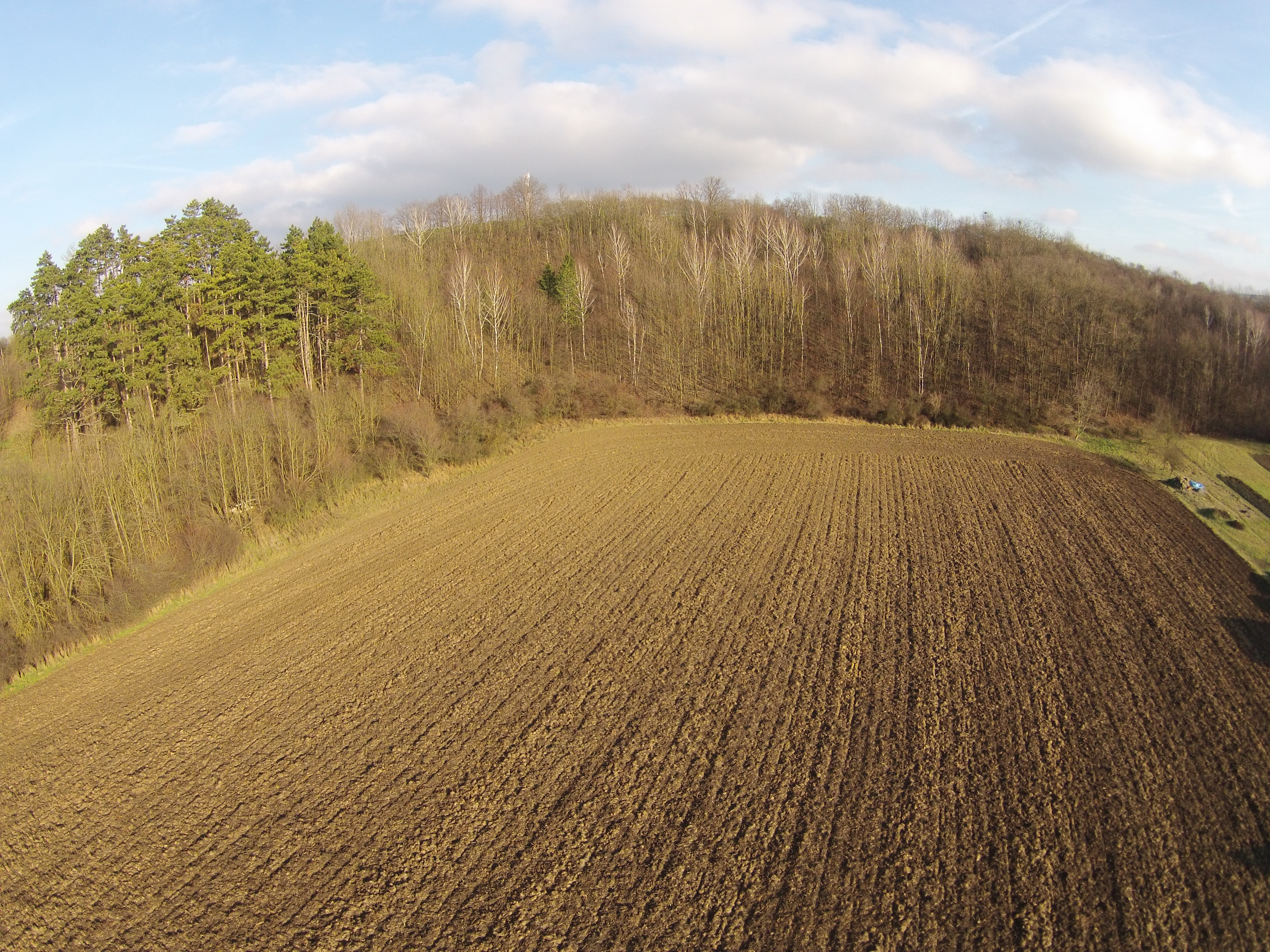 Přírodní památka Přední Galašek.